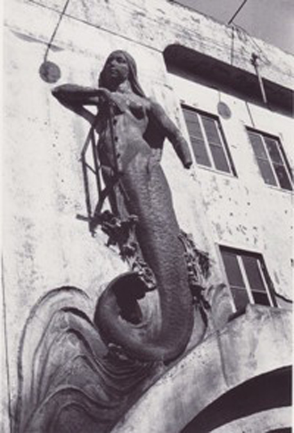 Asakusa Park Aquarium